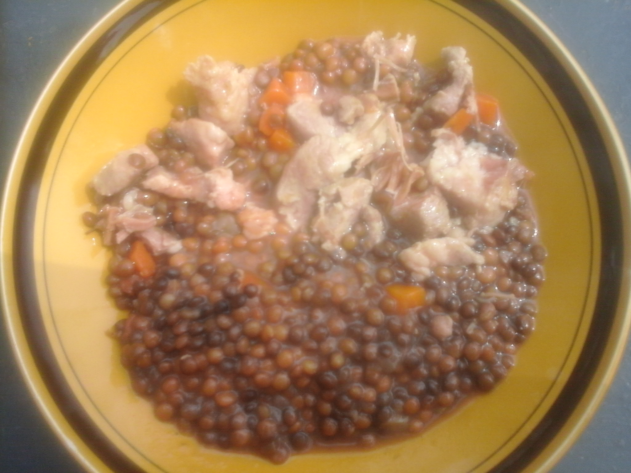 Petit salé aux lentilles.